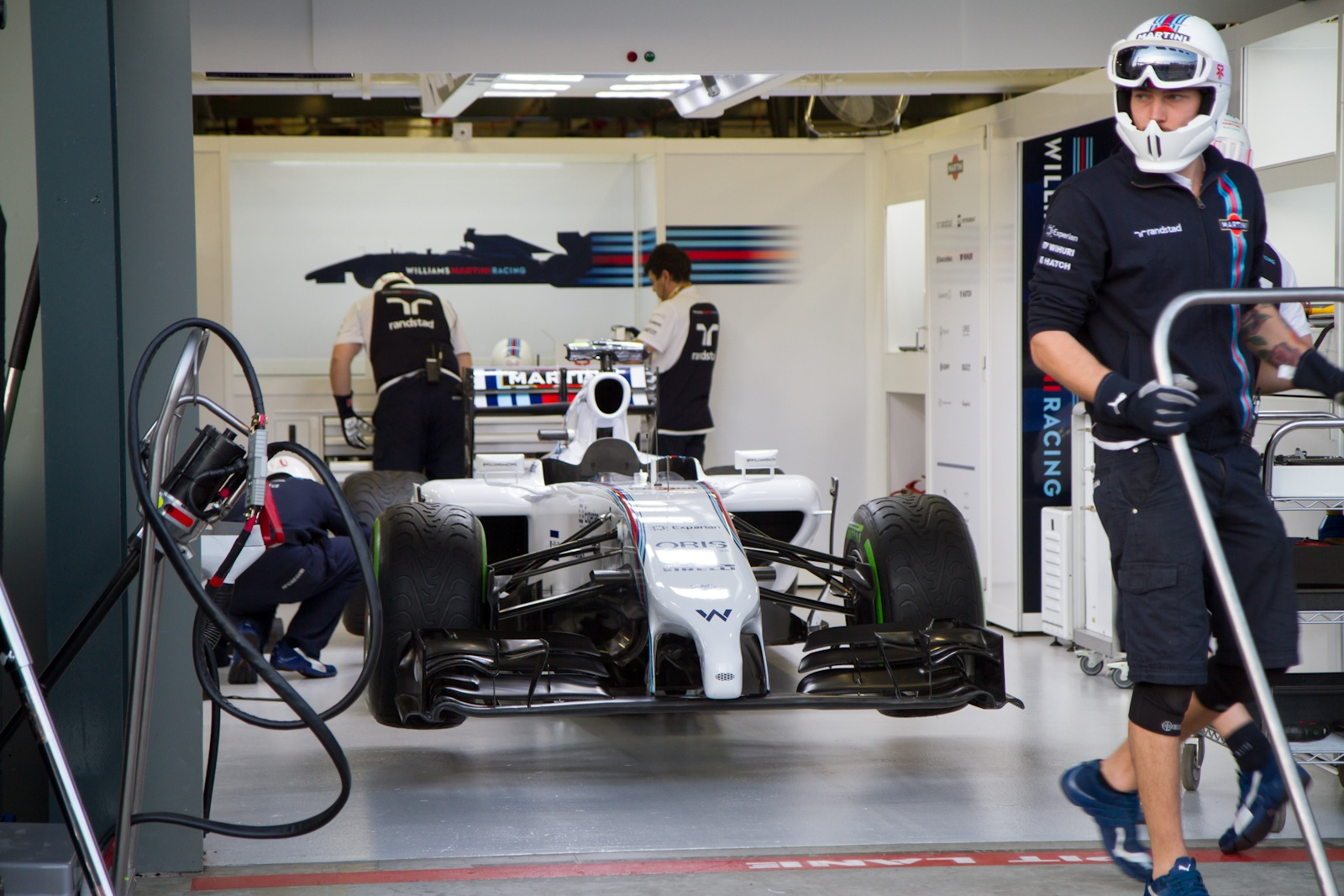 Williams FW36 i depån